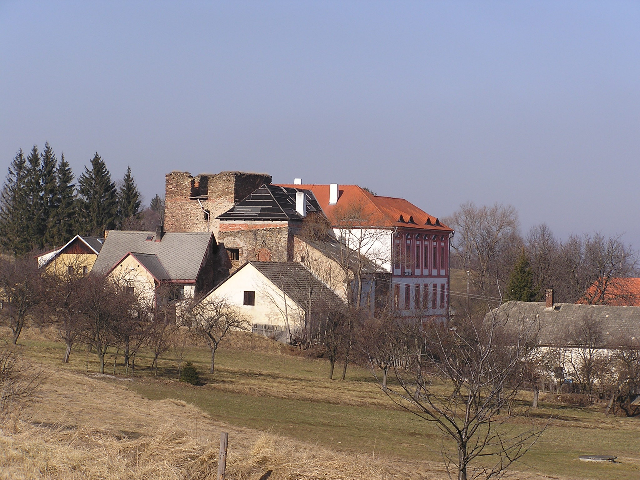 Tvrz v Dobrši